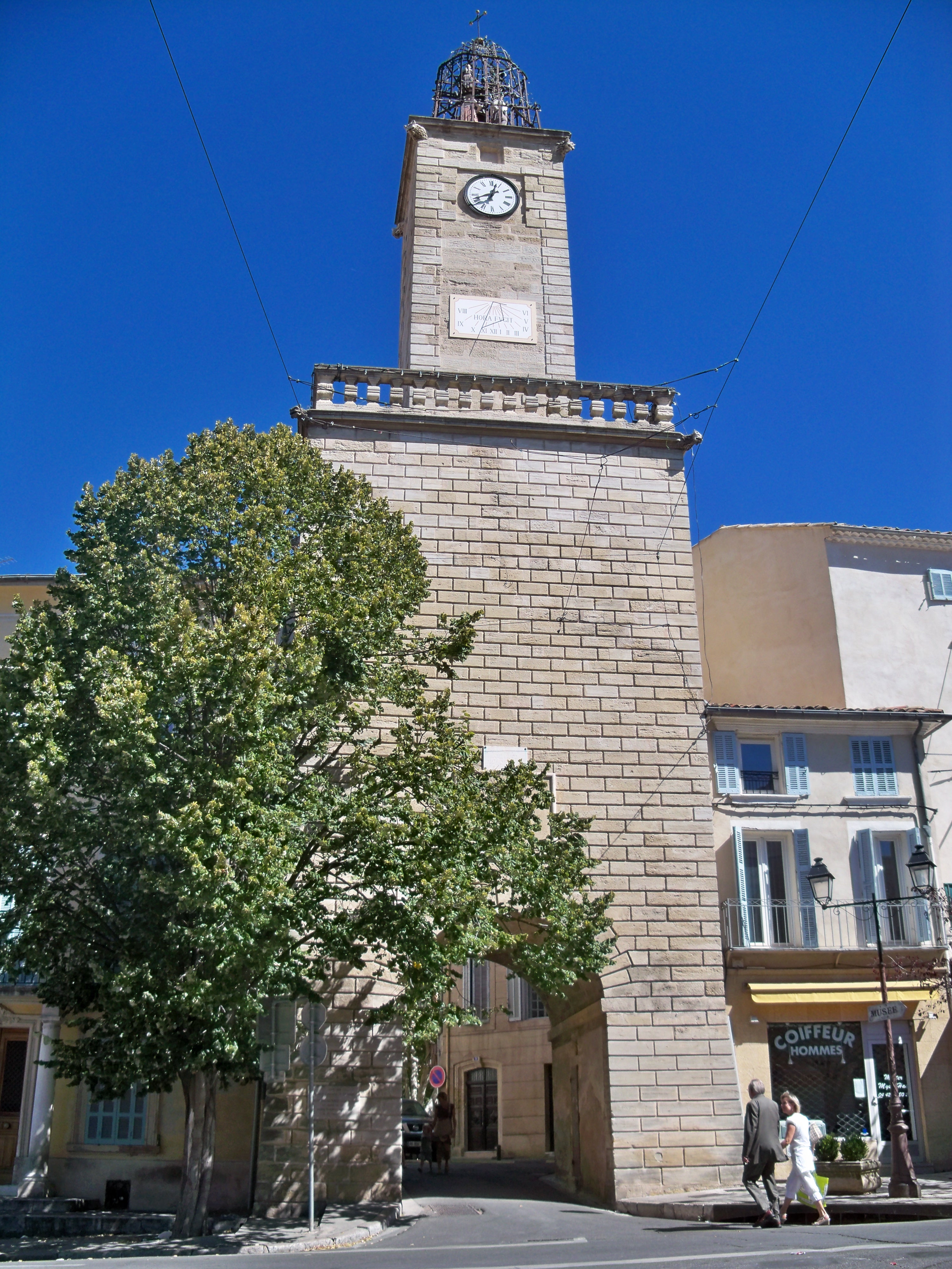 Tour de l'horloge - Jacquemard, sur la Porte de Salon, Lambesc, Bouche du Rhône, France